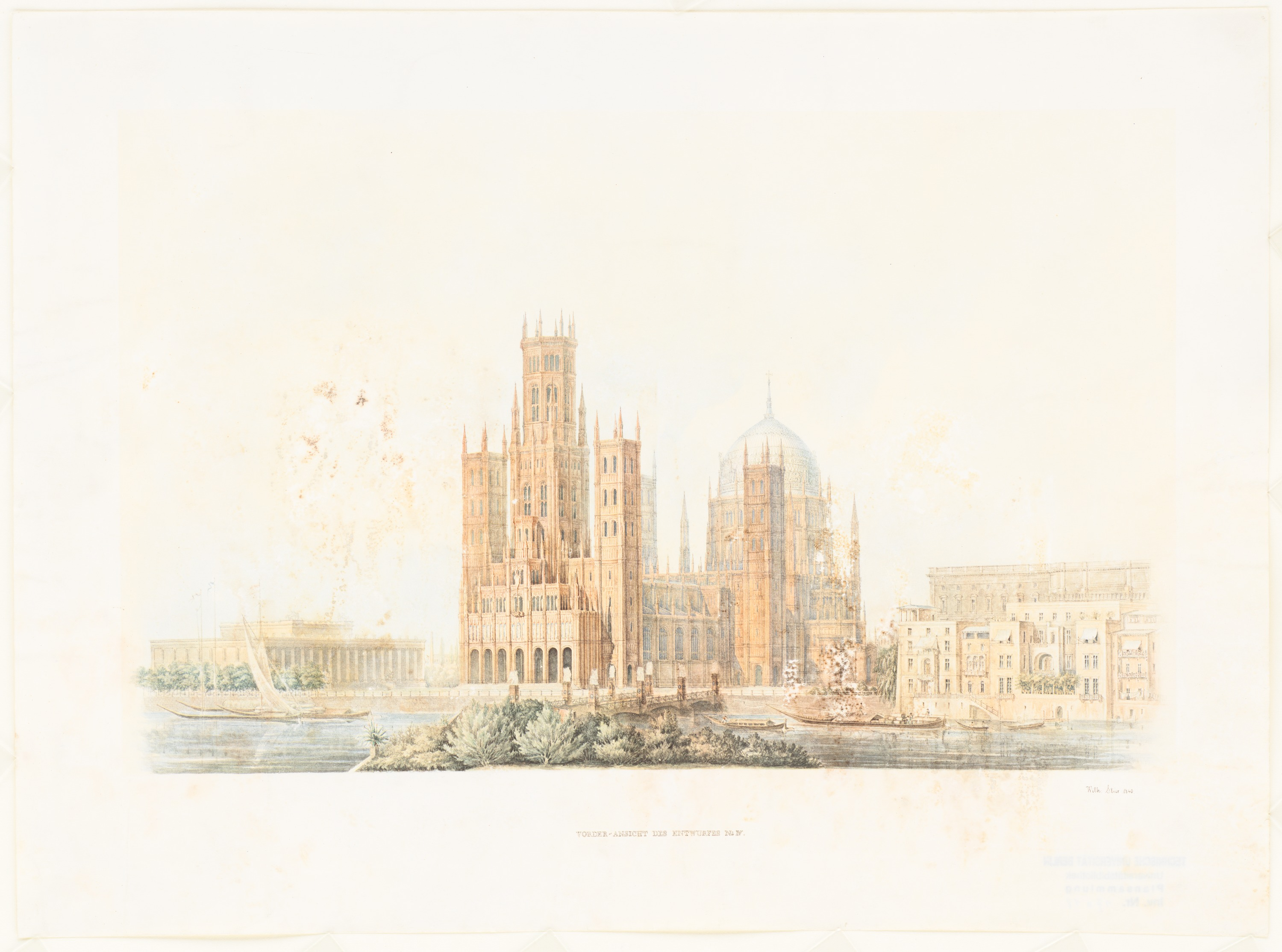 Stier Wilhelm (1799-1856), Berliner Dom: Perspektivische Ansicht Entwurf IV. Druck farbig auf Papier, 33,1 x 44,5 cm (inkl. Scanrand). Architekturmuseum der Technischen Universität Berlin Inv. Nr. 17018.